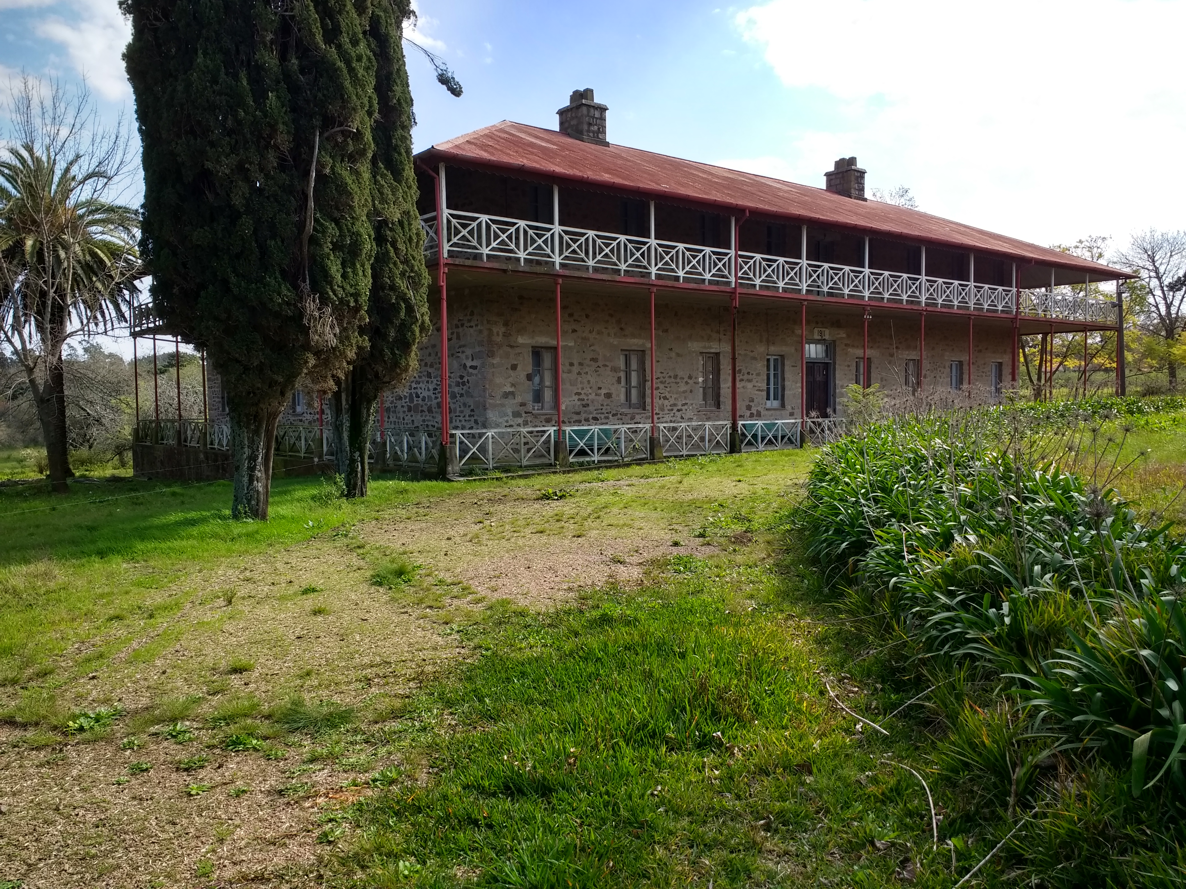 Hotel Conchillas, diseñado por el inglés Enrique Pepperall e inaugurado en 1911.